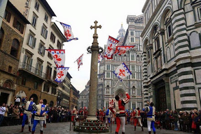 Commemorazione del miracolo di san Zanobi intorno alla colonna che ricorda da secoli l'evento miracoloso in piazza san Giovanni a Firenze